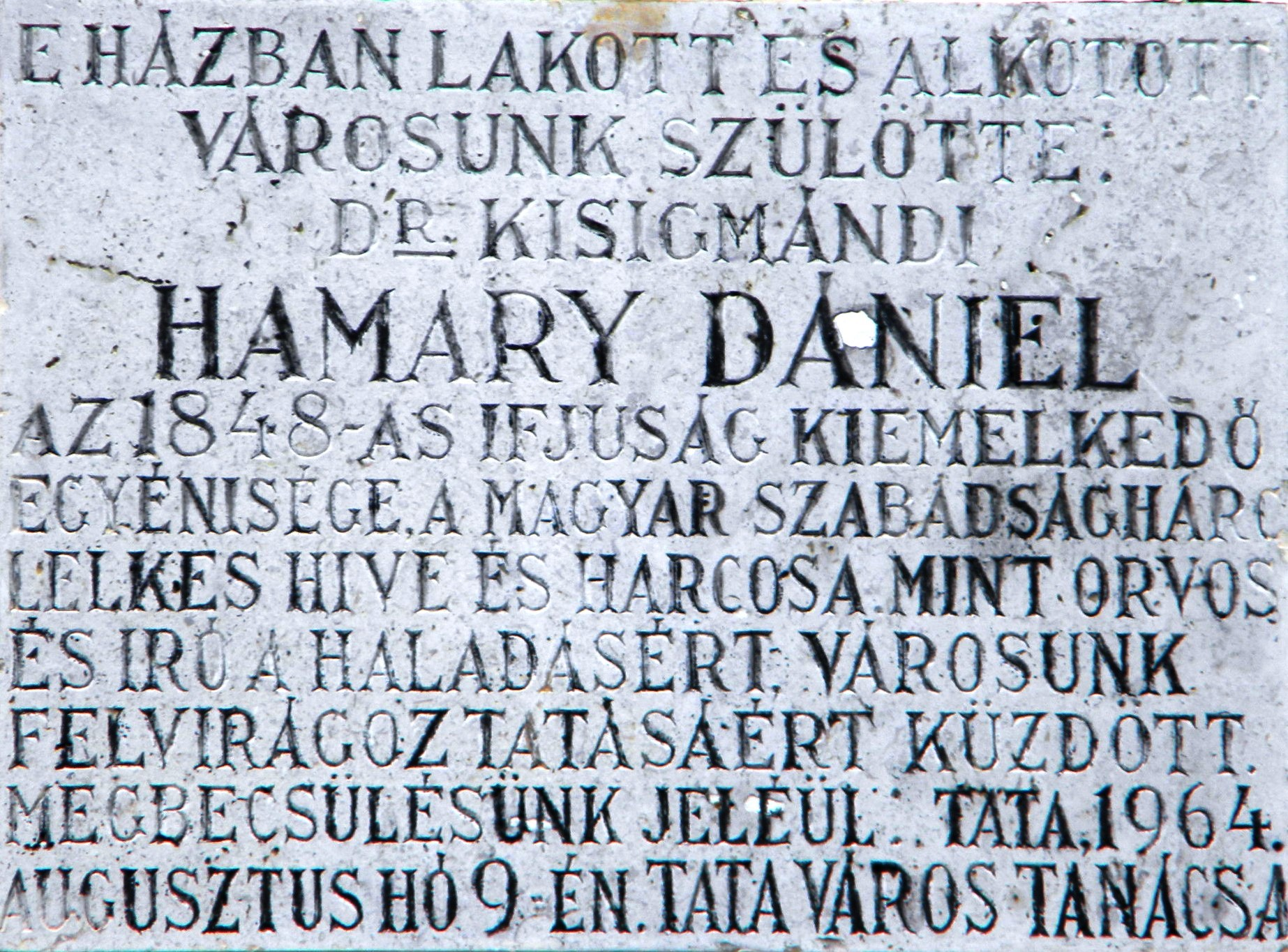 Emléktábla Hamary Dániel szülőházának falán.